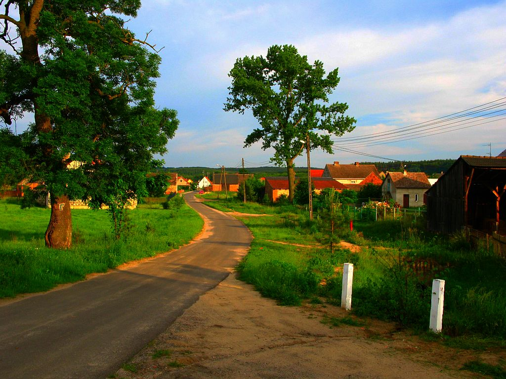 Laski - widok w kierunku południowym